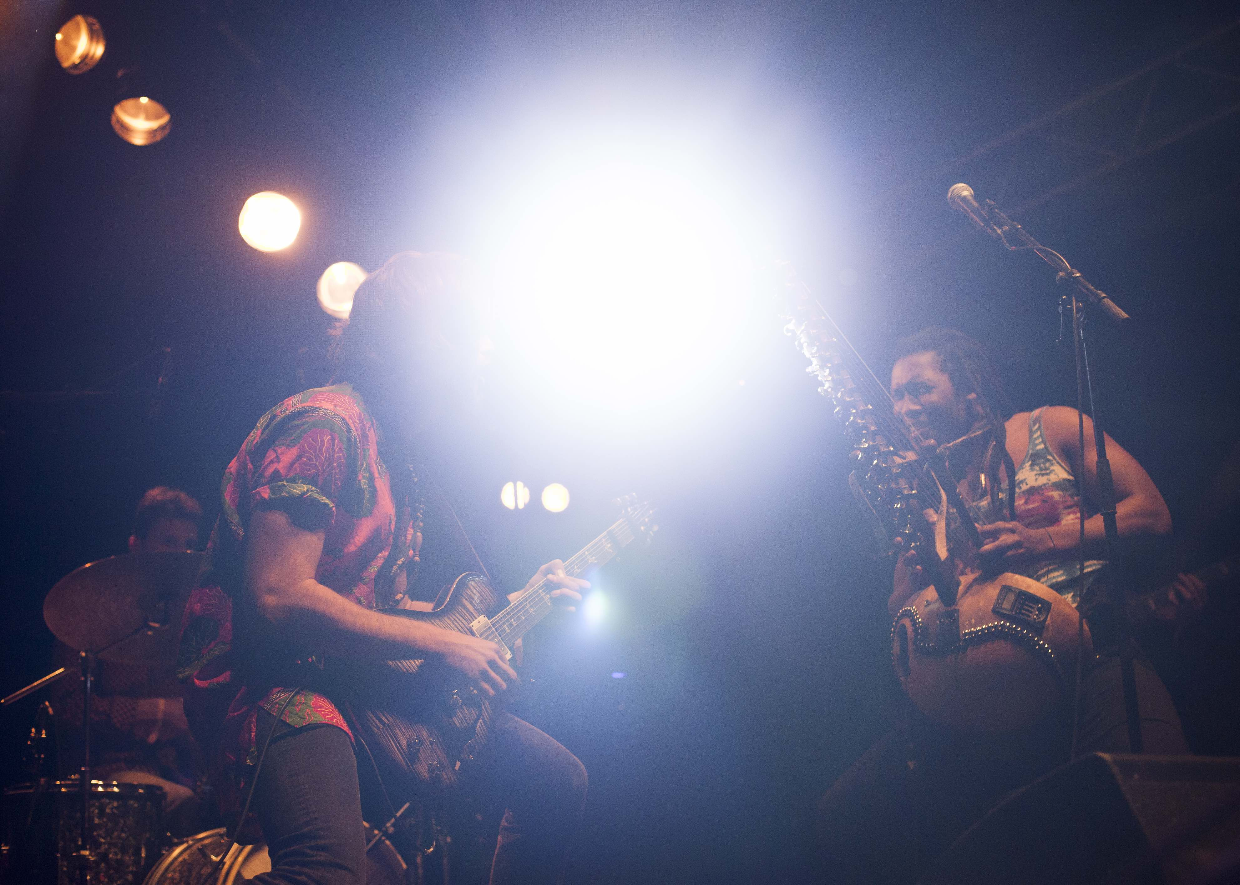 SISELABONGA live am B-sides Luzern, Glauco Catadlo (Guit), Tarang Cissokho (Kora), Fabio Meier (Drums)